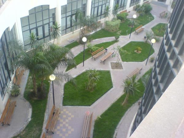 UFE garden